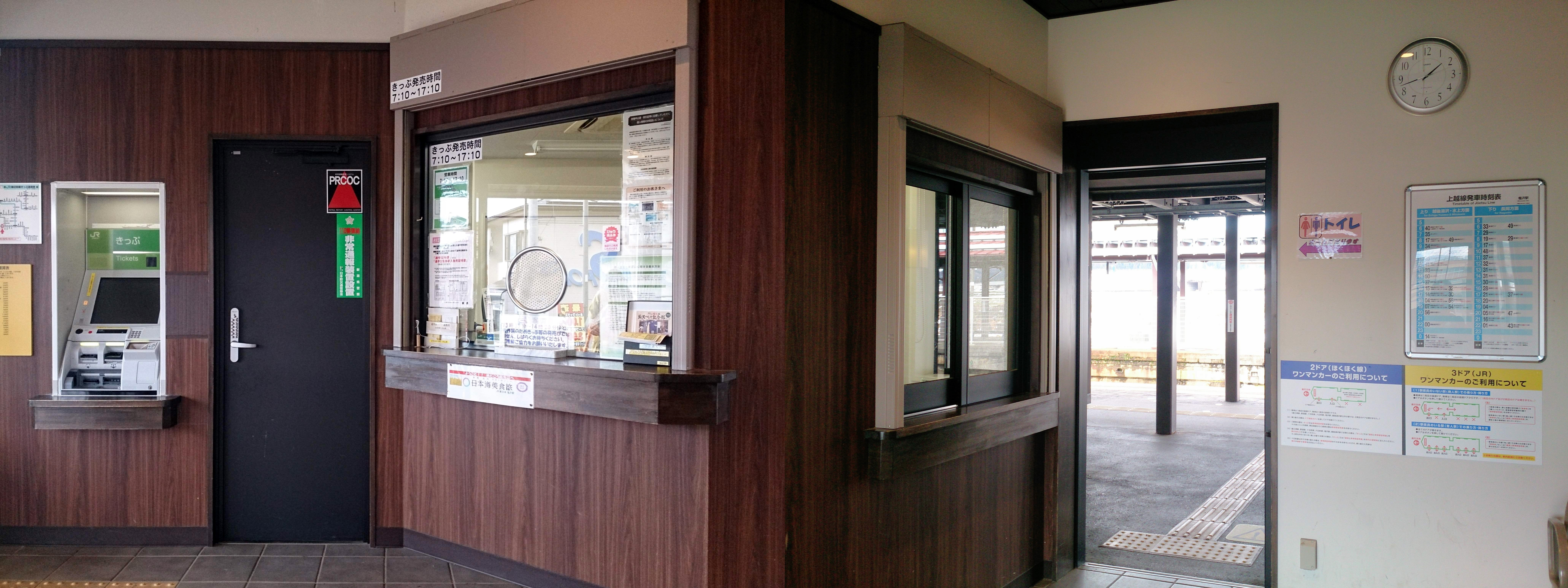 塩沢駅のコンコース周辺